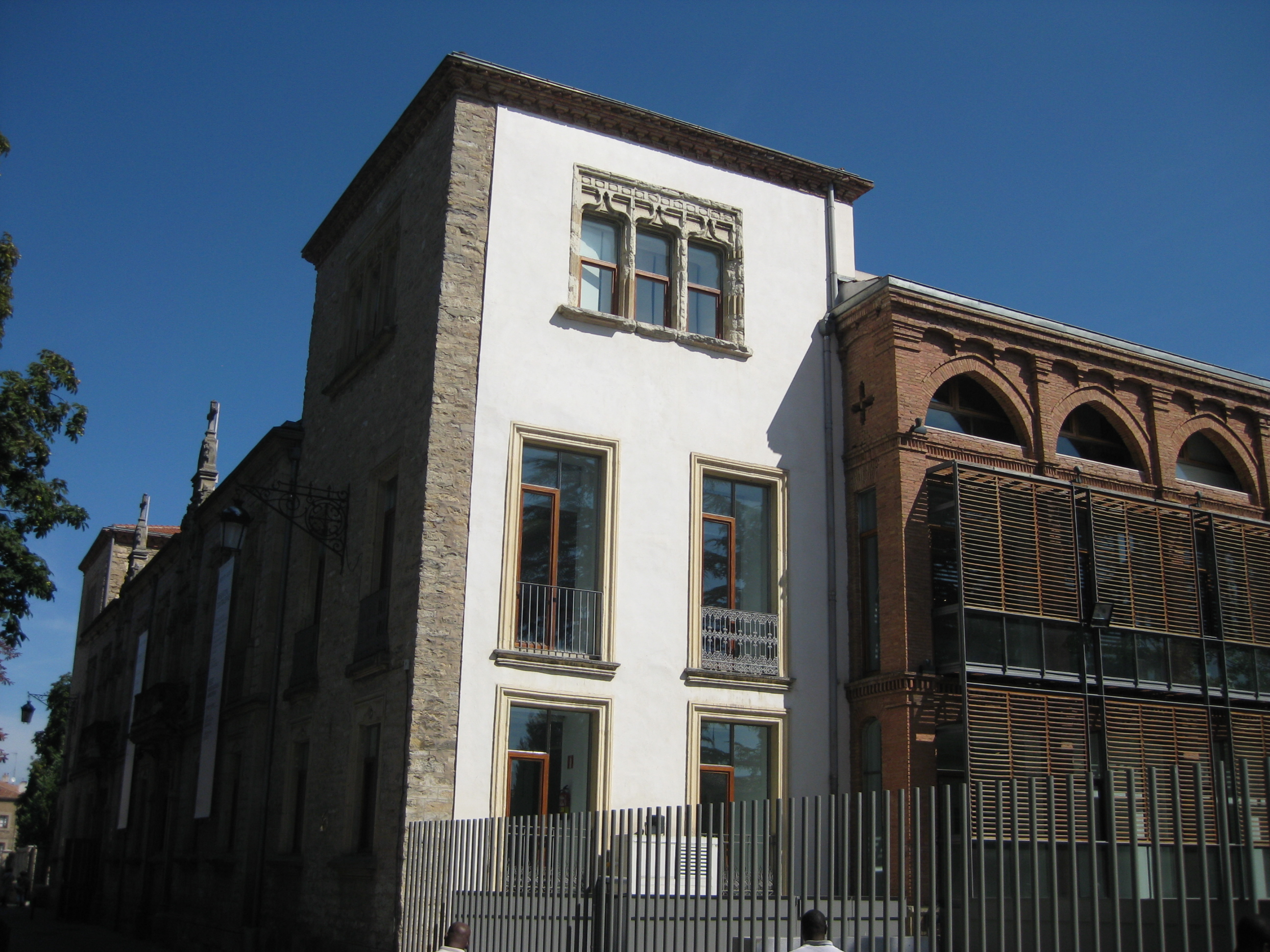 El Palacio de Montehermoso, en el casco medieval de Vitoria, acoge un centro cultural vanguardista.